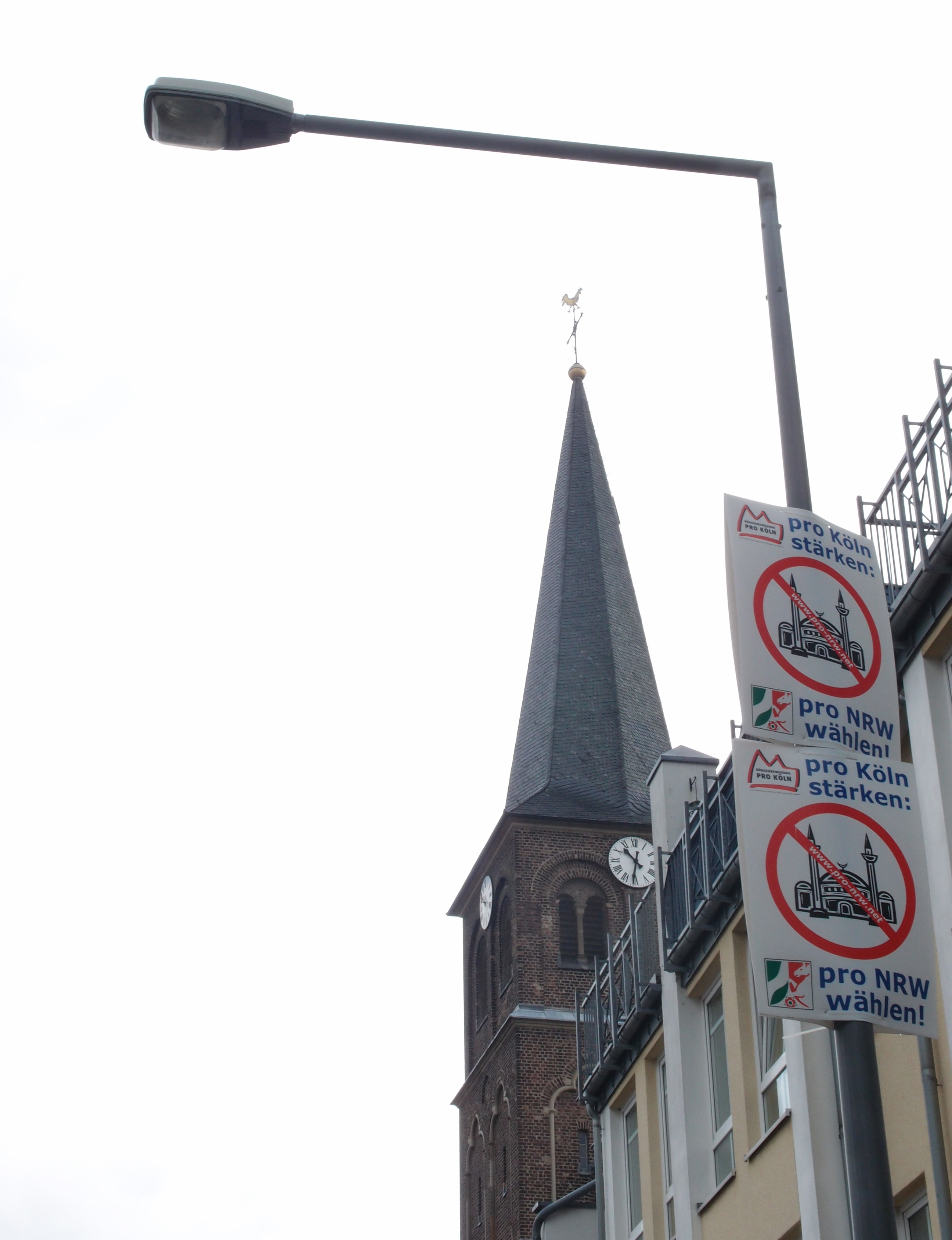 Wahlkampfplakat der "Bürgerbewegung pro Köln" / "Bürgerbewegung pro NRW" zur NRW-Wahl/2012 - vor der kath. Kirche in Köln-Urbach Datum: 21.04.2012 Urheber: M. Pfeiffer alias Benutzer:Gordito1869 Quelle: privates Fotoarchiv des Urhebers Garantieerklärung des Urhebers: es handelt sich um ein authentisches Originalfoto, das nicht via Fotomanipulation verändert wurde